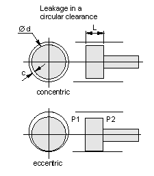 Hydraulic clearance leakage